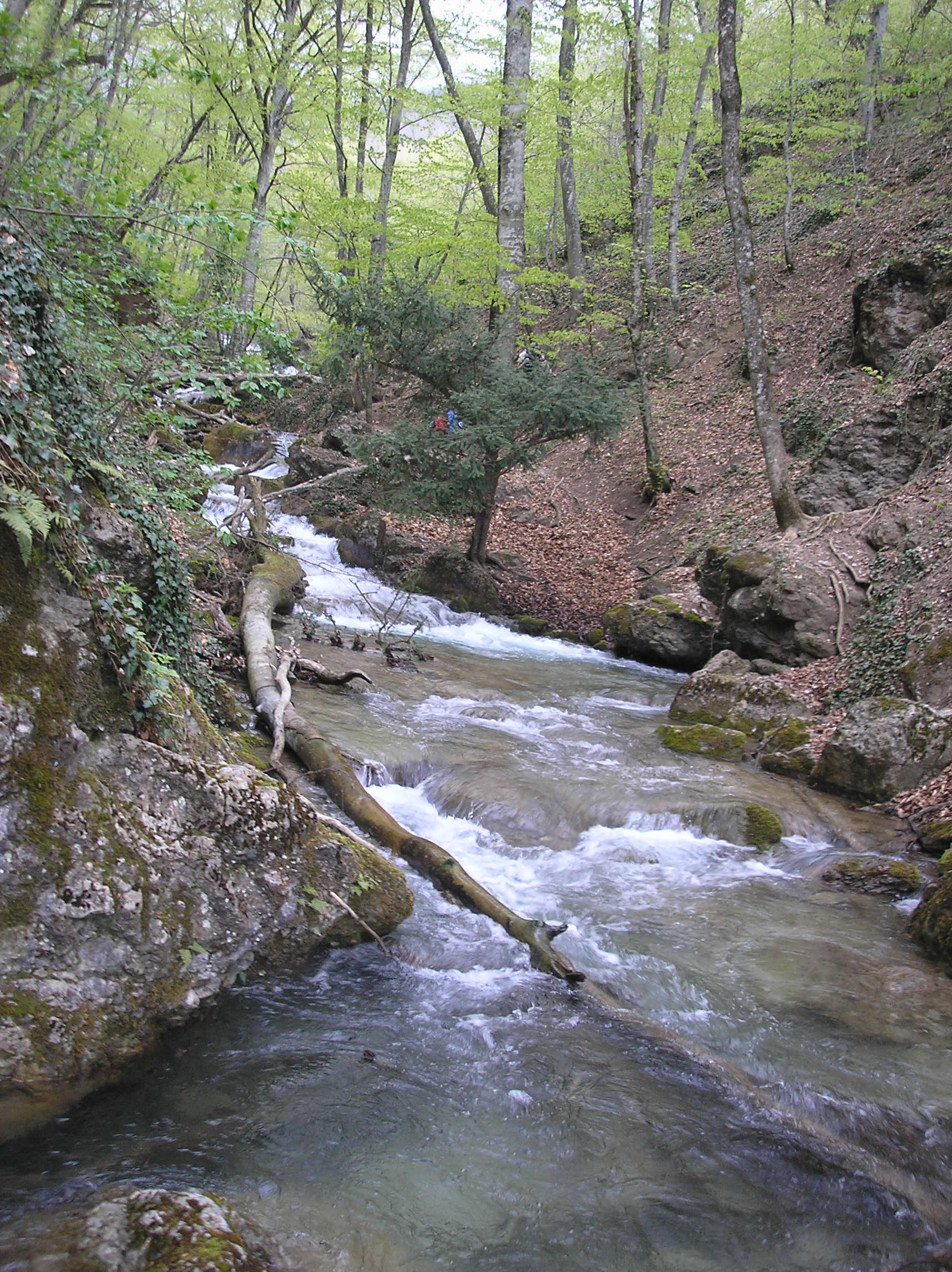 Річка Улу-Узень Східний, на якій знаходиться найбільш повноводний водоспад Криму Джур-Джур